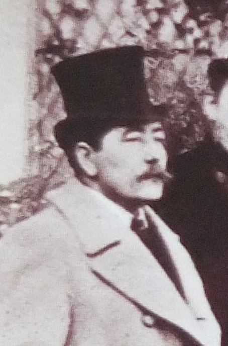 Photo prise par le comte Joseph Napoléon Primoli : Le perron d'Edmond de Goncourt en 1890 - (détail)